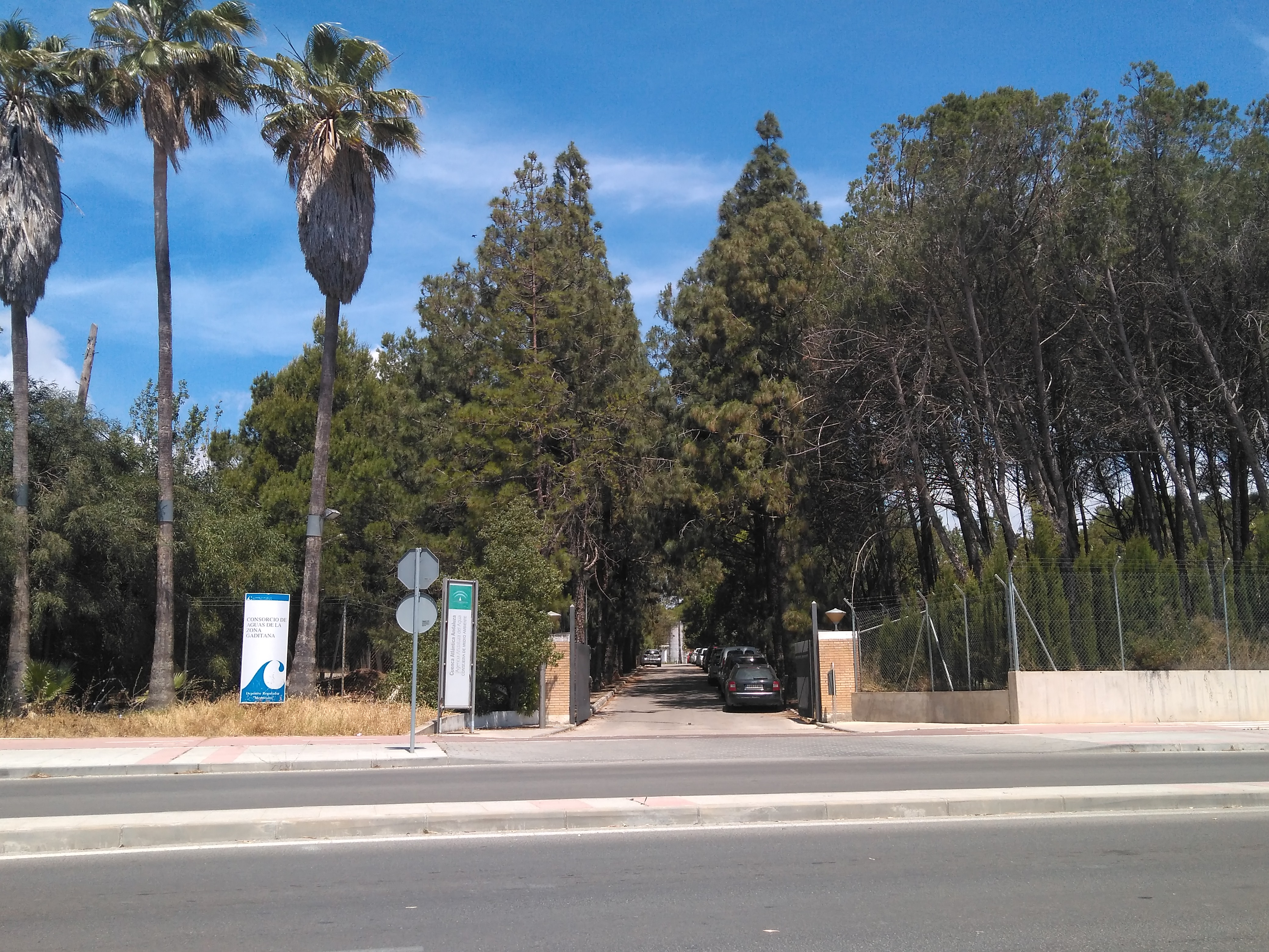 Instalaciones del Consorcio de Aguas de la Zona Gaditana y de Cuenca Atlántica Andaluza (Agencia Andaluza del Agua, Consejería de Medio Ambiente de la Junta de Andalucía)